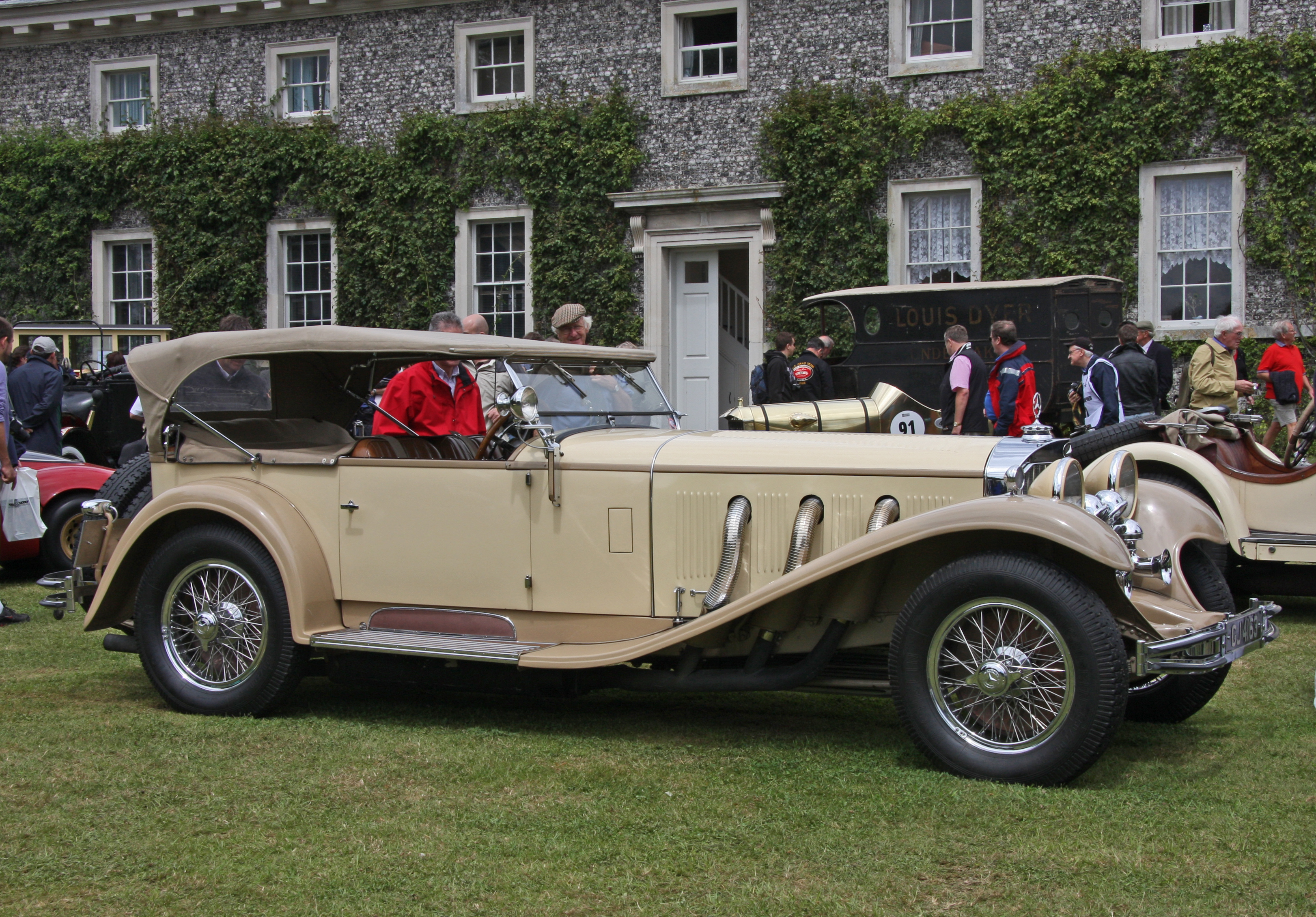 1930 Mercedes-Benz 38250 SS Tourer